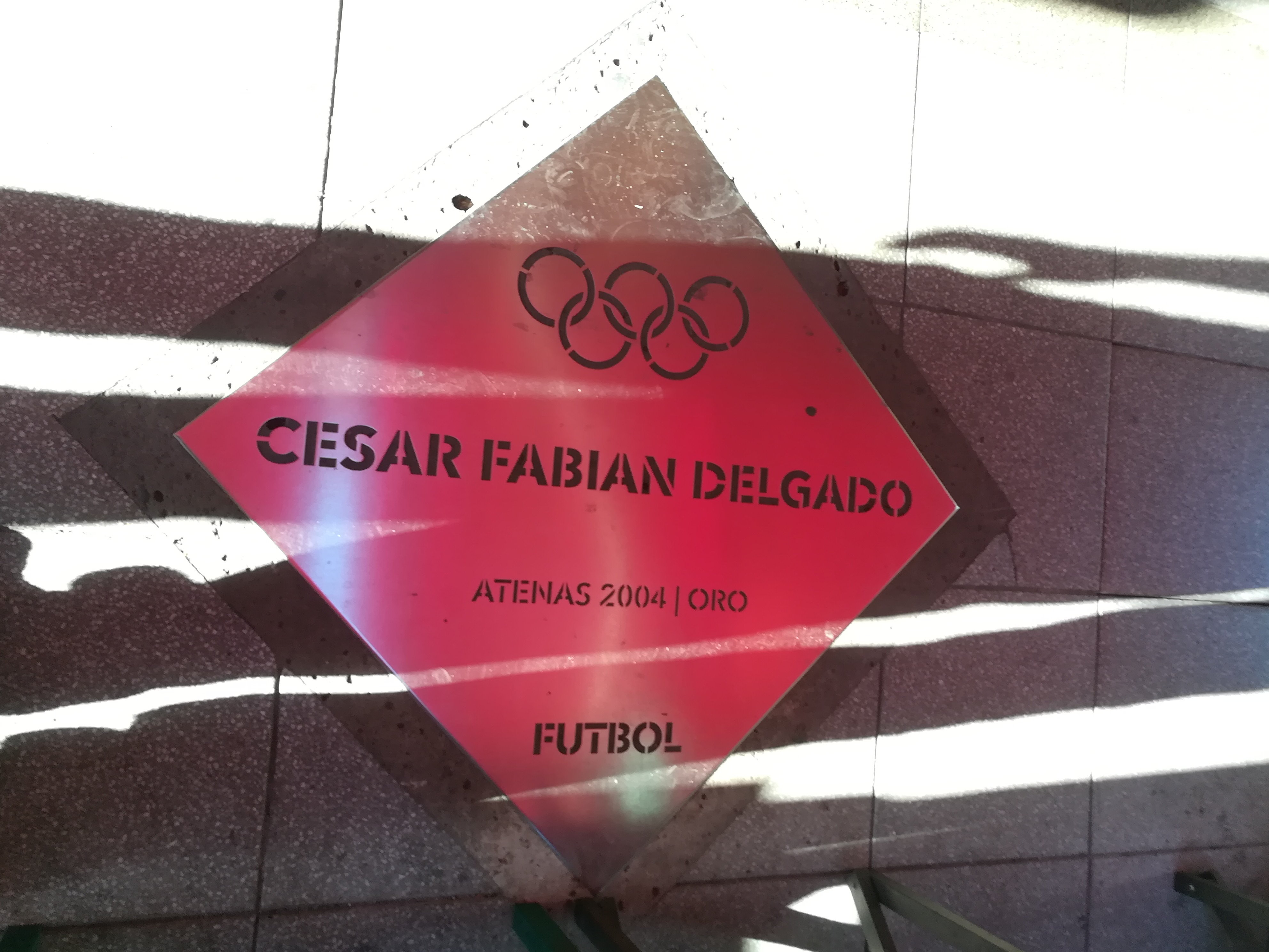 Paseo de los Olímpicos de los en la Avenida Pellegrini (Rosario).